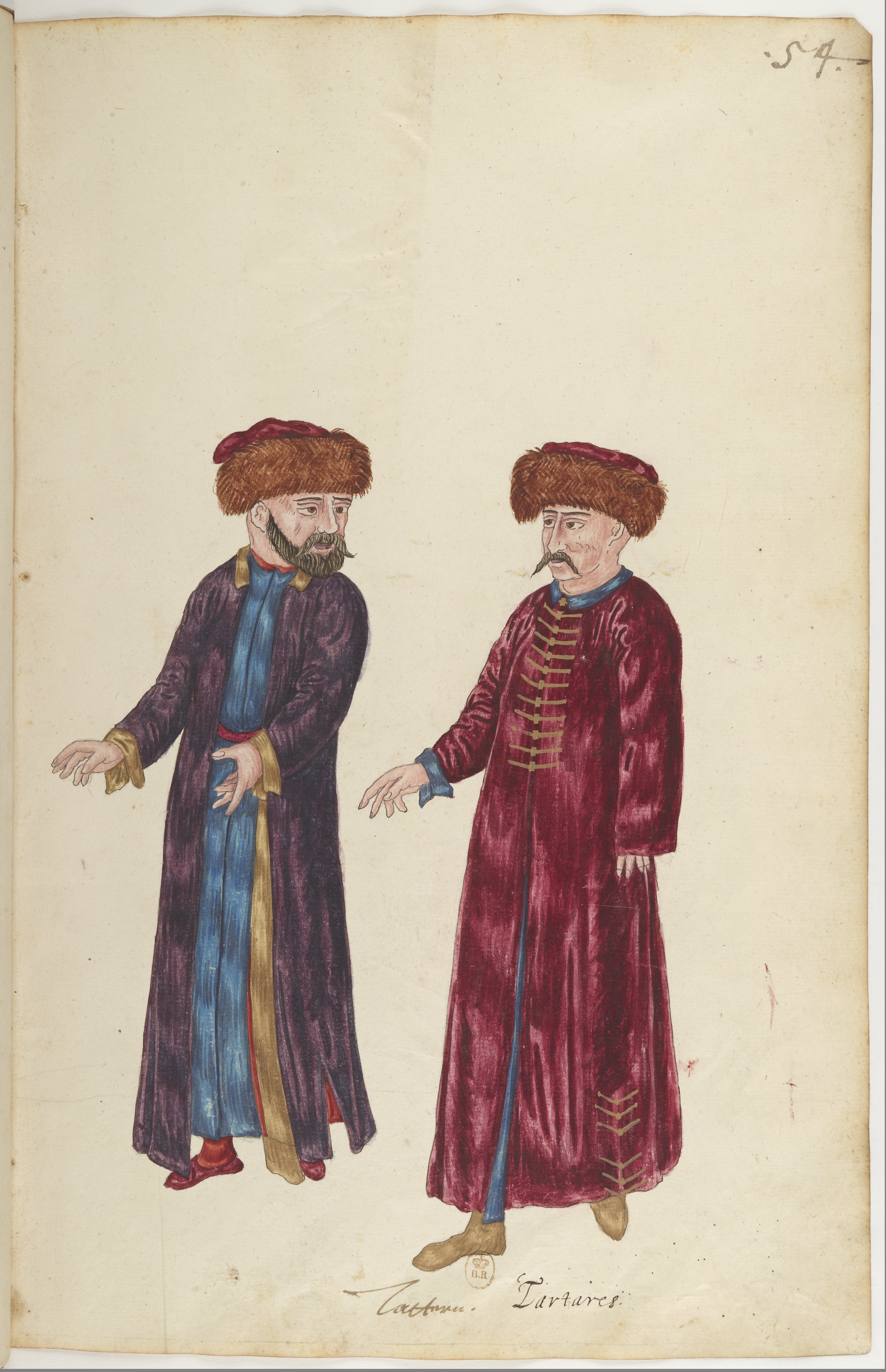 Tartares